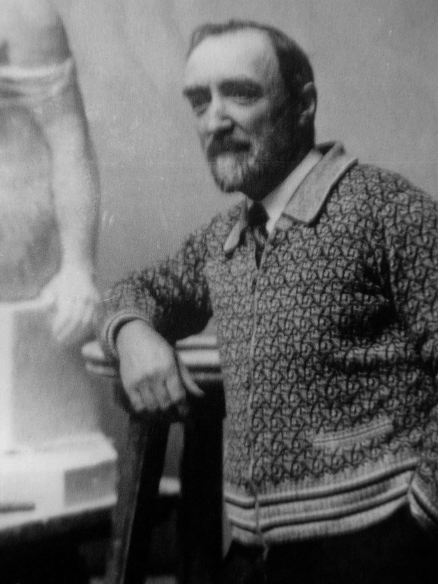 Robert Wlérick, sculpteur